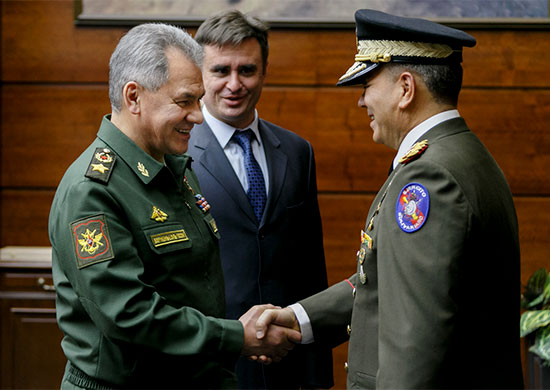 Встреча Министра обороны Российской Федерации генерала армии Сергея Шойгу с Министром обороны Боливарианской Республики Венесуэла генерал-аншеф Владимиром Падрино Лопесом